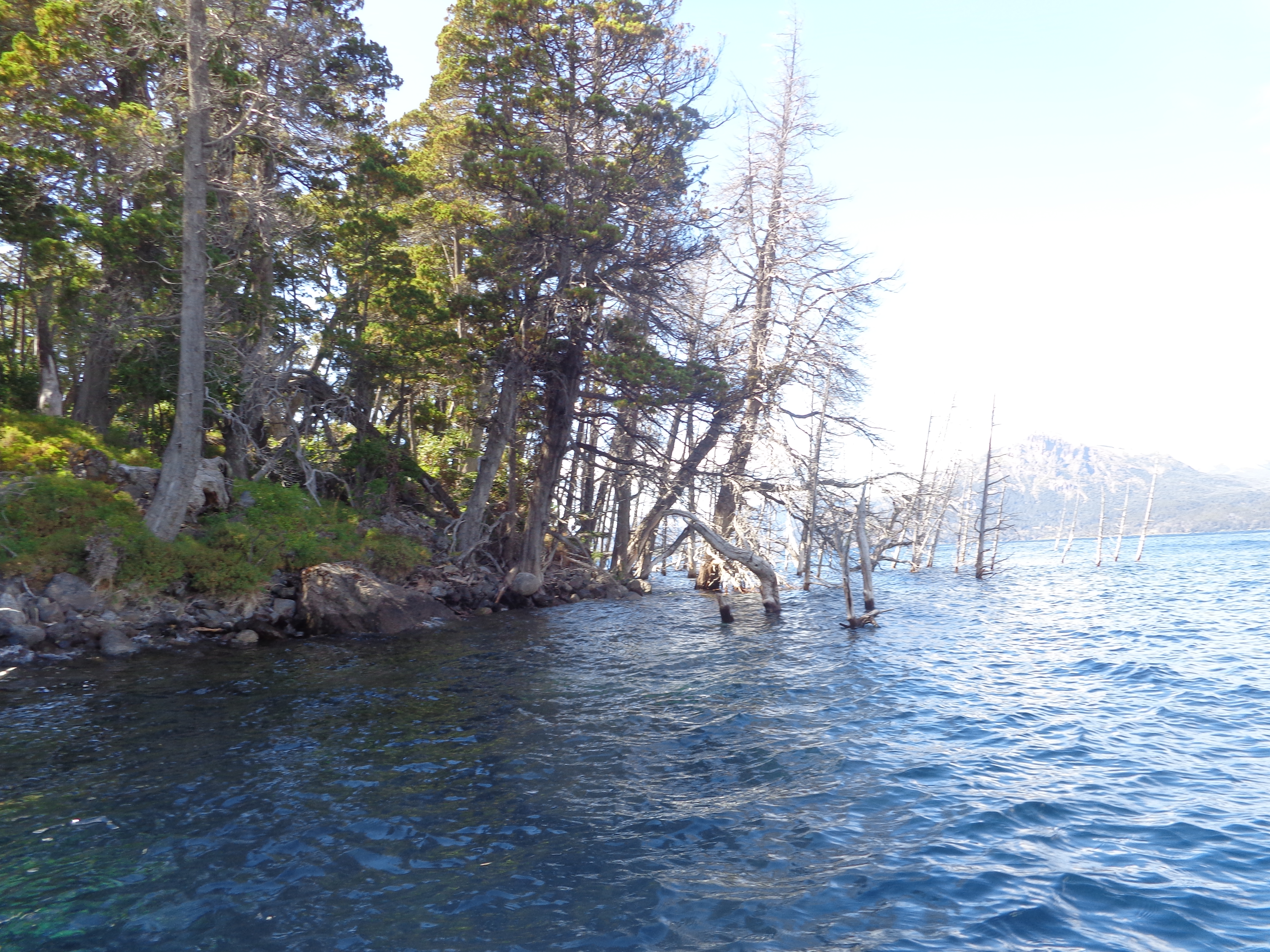 A simple vista, puede apreciarse un bosque sumergido. Es un fenómeno de desplazamiento de las rocas montañosas hacia el lago que provocó el hundimiento de los árboles. Es un proceso que lleva casi 80 años y se estima que en la actualidad el desplazamiento es de 36 cm. anuales.